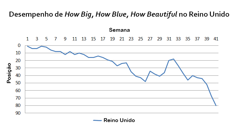 Gráfico de desempenho do álbum How Big, How Blue, How Beautiful na tabela musical do Reino Unido, o UK Albums Chart